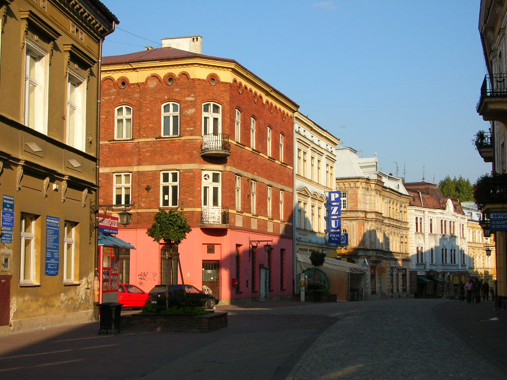 Tarnów - ul.Wałowa.